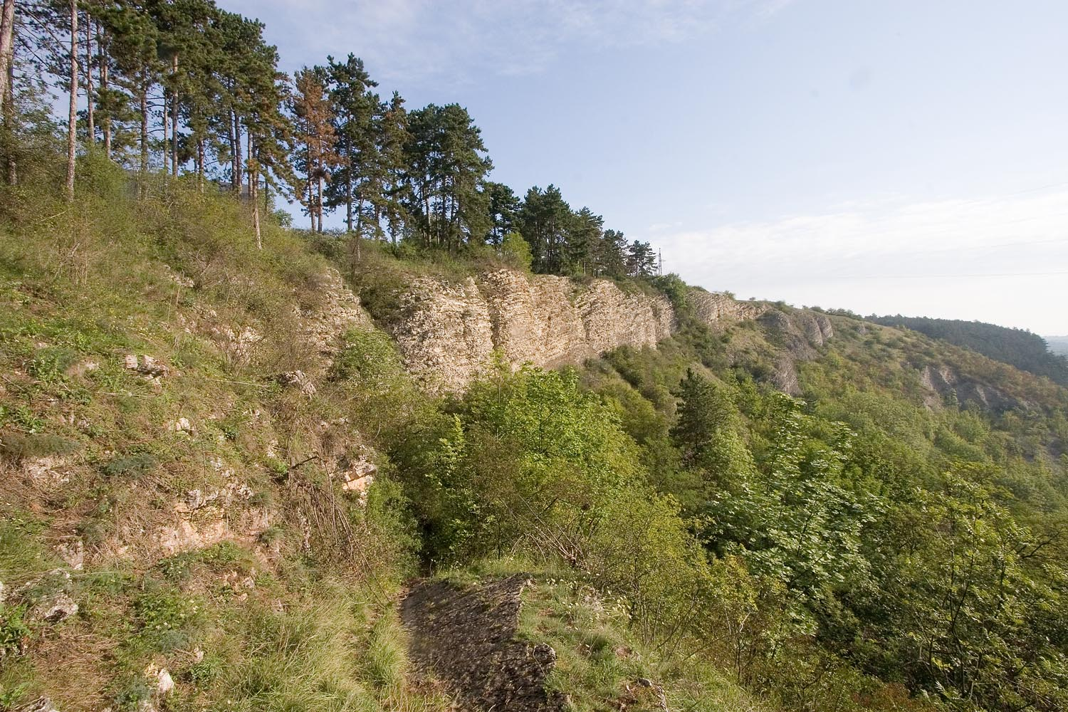 NPP Černá rokle